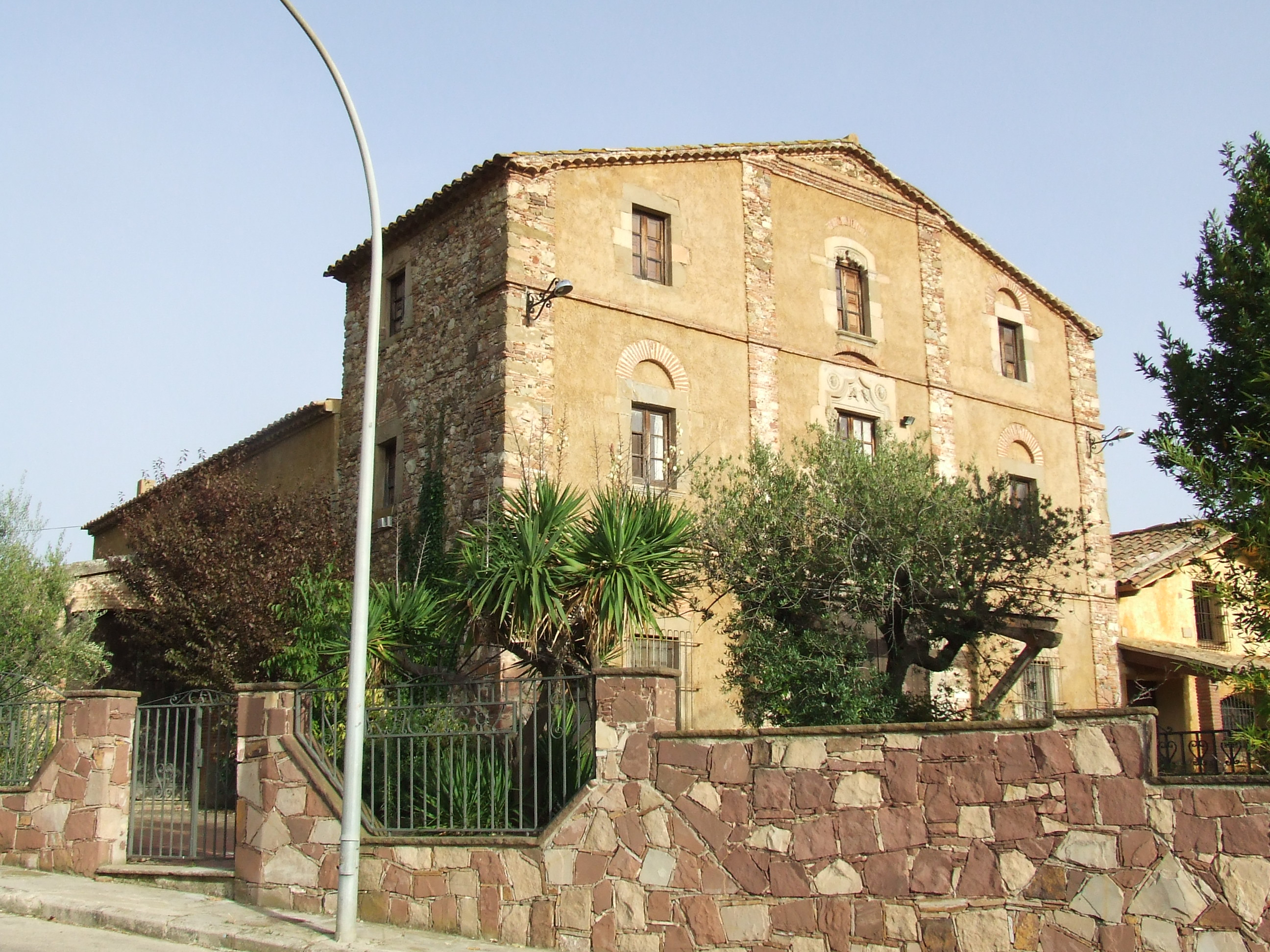 Can Regassol (Bigues, Bigues i Riells, Vallès Oriental)